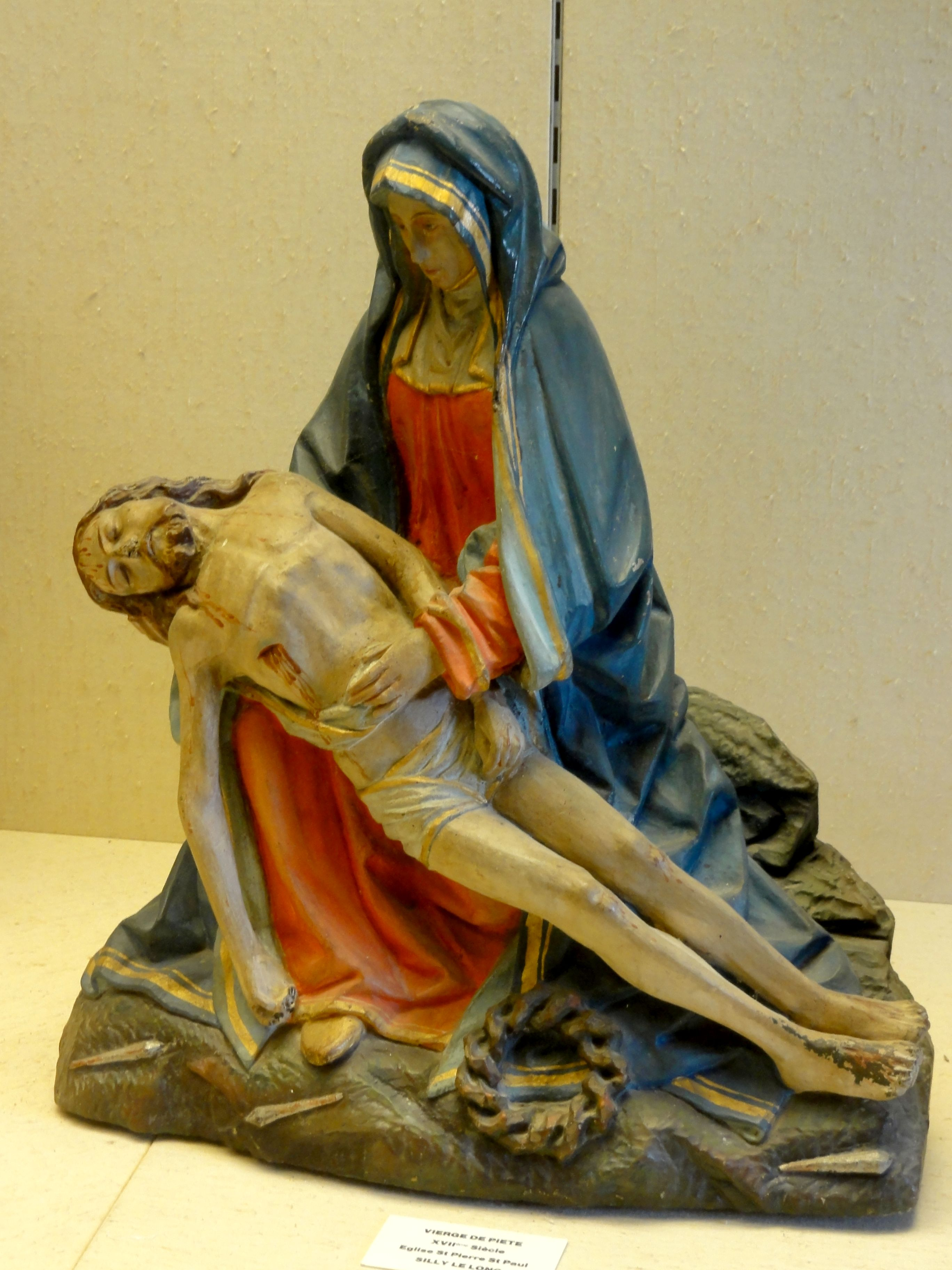 Pietà du XVIIe s., provenant de l'église Saint-Pierre-Saint-Paul.